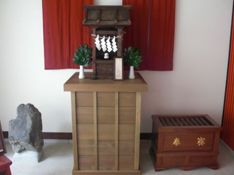 京都神田神宮内部